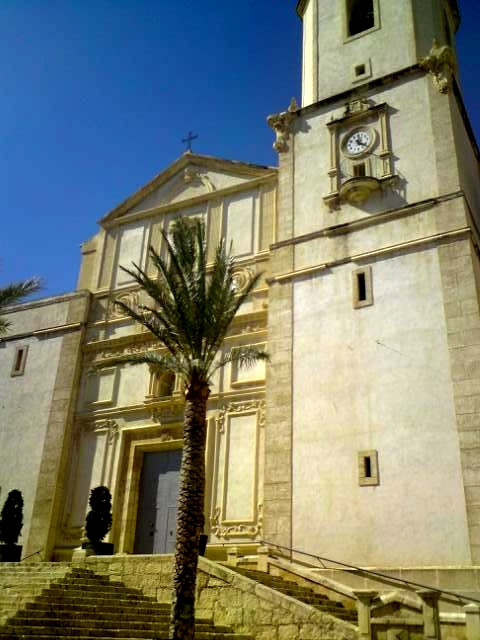 La Nucia Iglesia